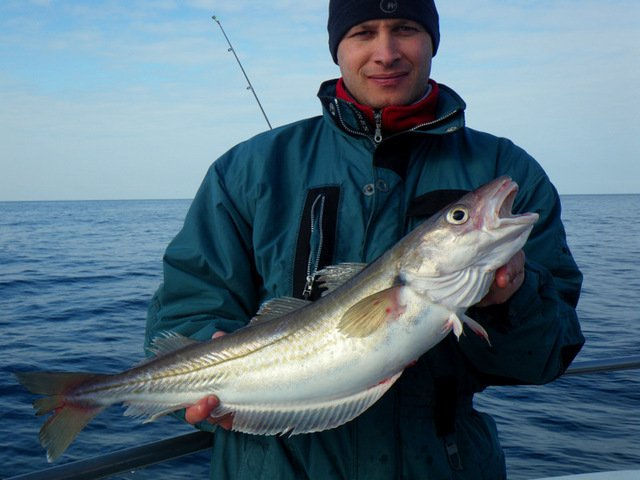 une journée à bord de out-rage avec comme capitaine sebastien gas